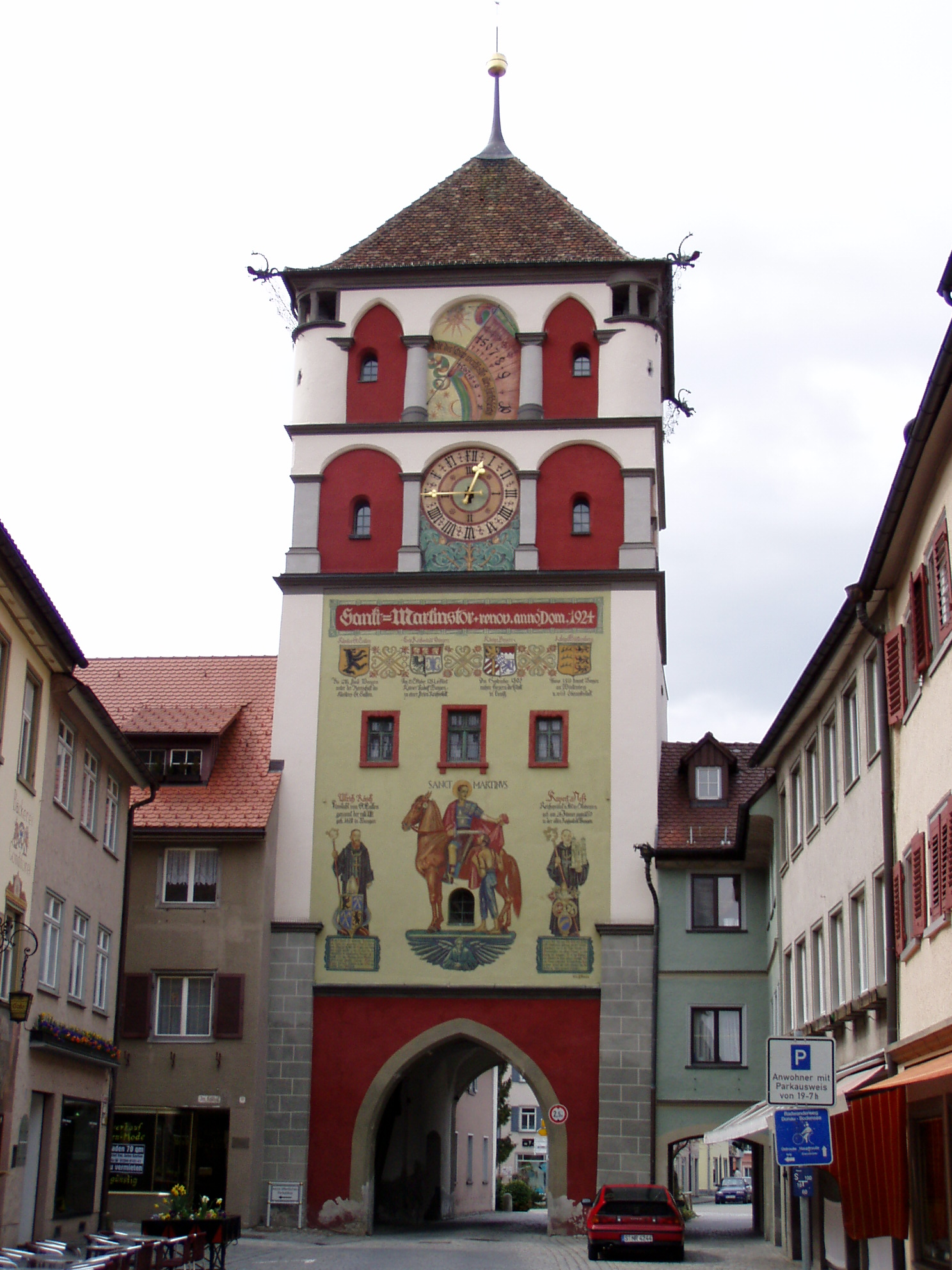 Martinstor, Wangen im Allgäu